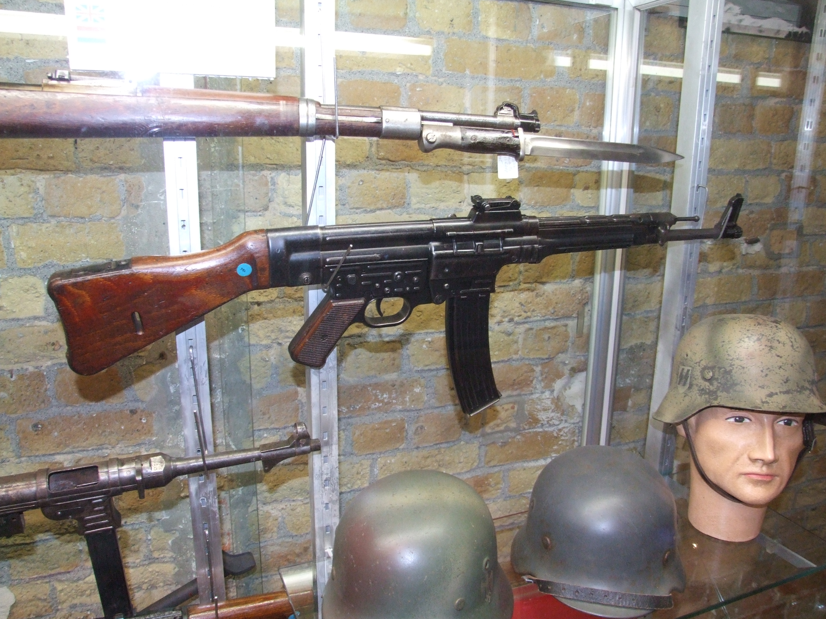 Schauvitrine mit deutschen Handfeuerwaffen im Mémorial du Souvenir, Dünkirchen; Sturmgewehr 44